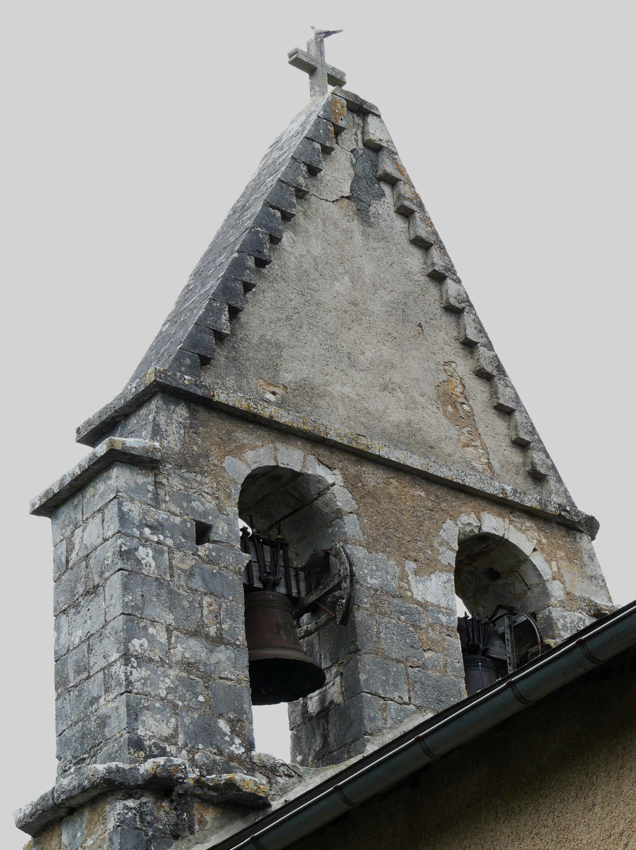 Le clocher-mur de l'église de Gabillou, Dordogne, France.